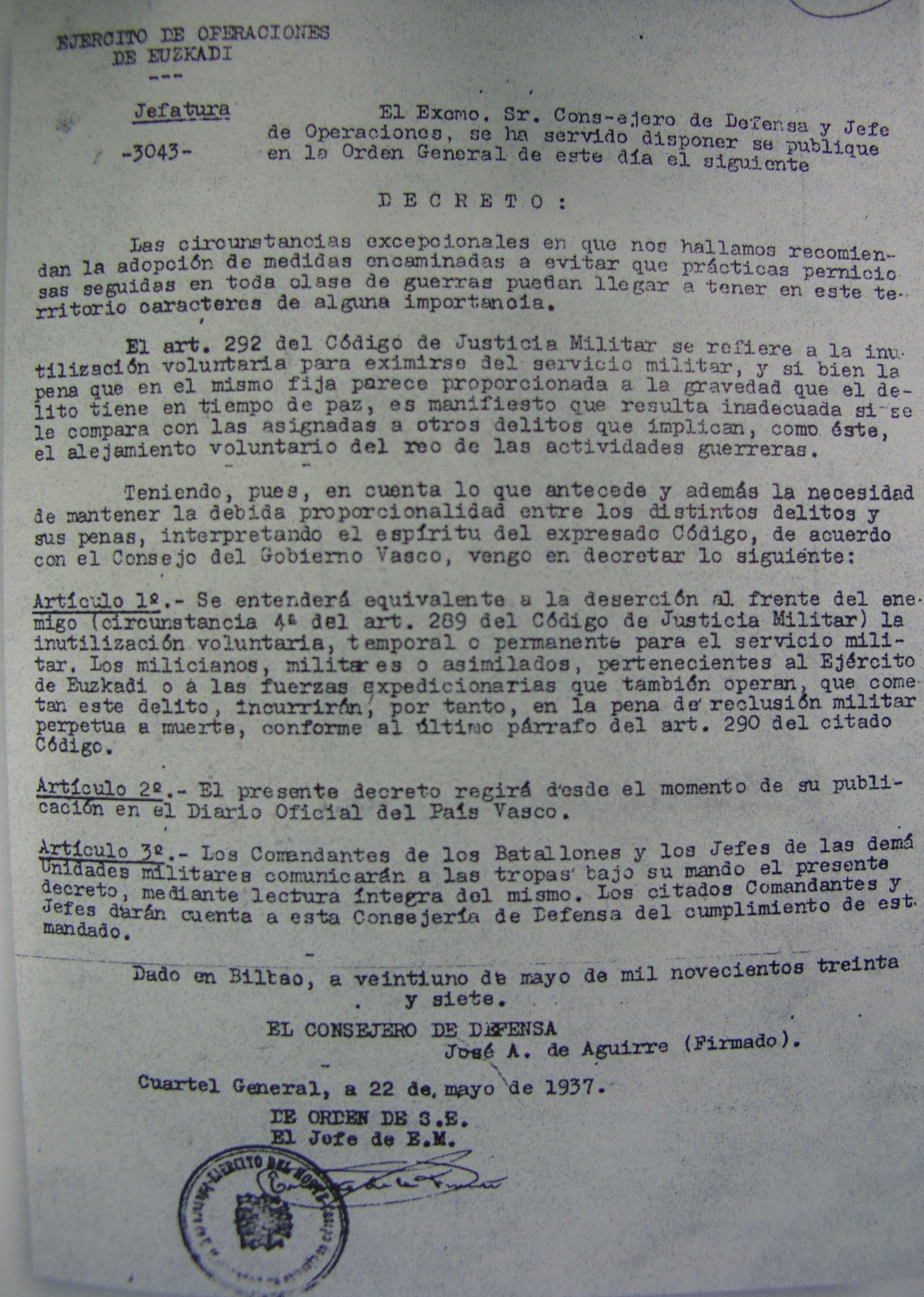 Government Decree signed by José Antonio Aguirre en 1937